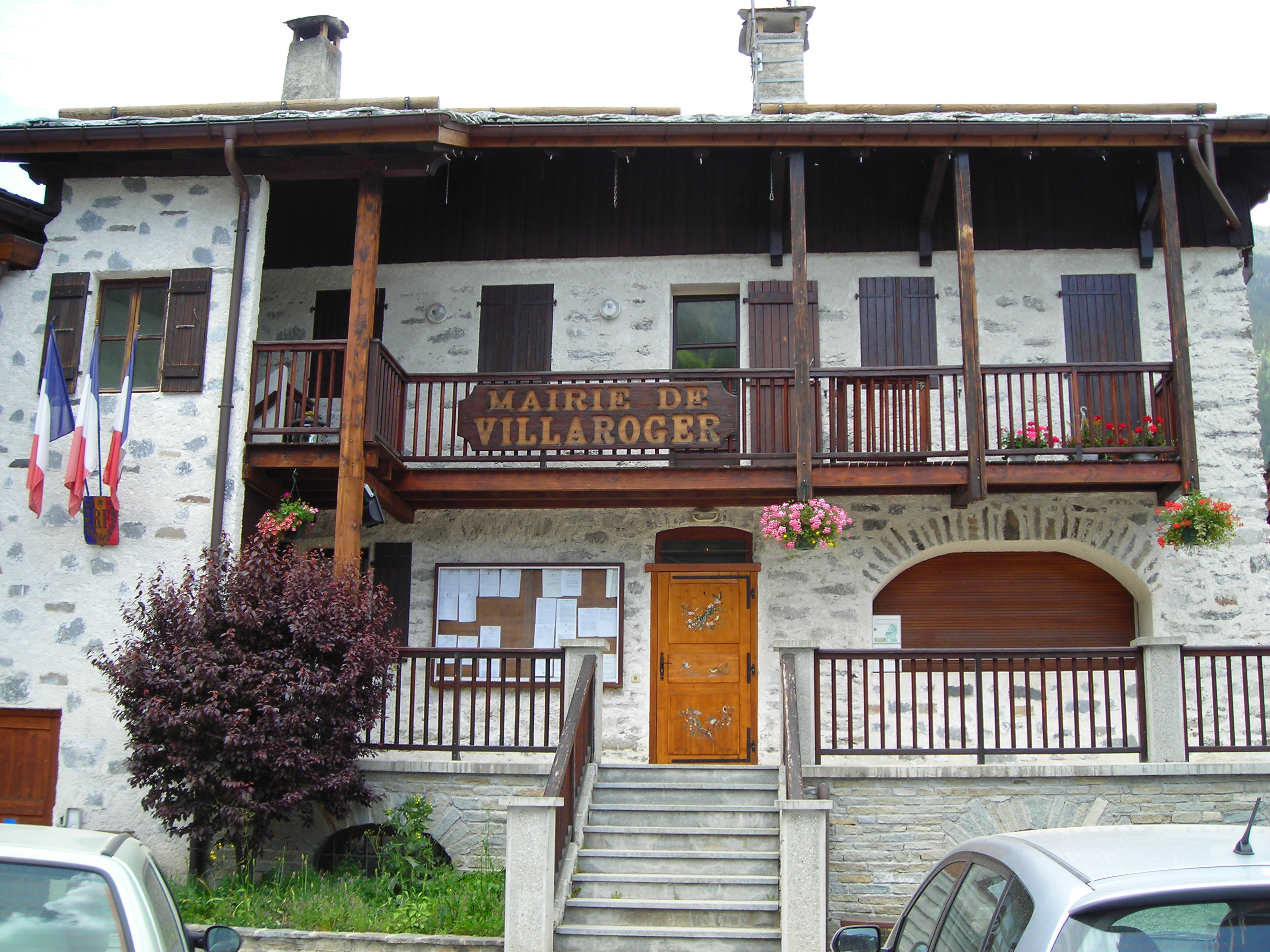 Mairie de la commune de Villaroger en Savoie